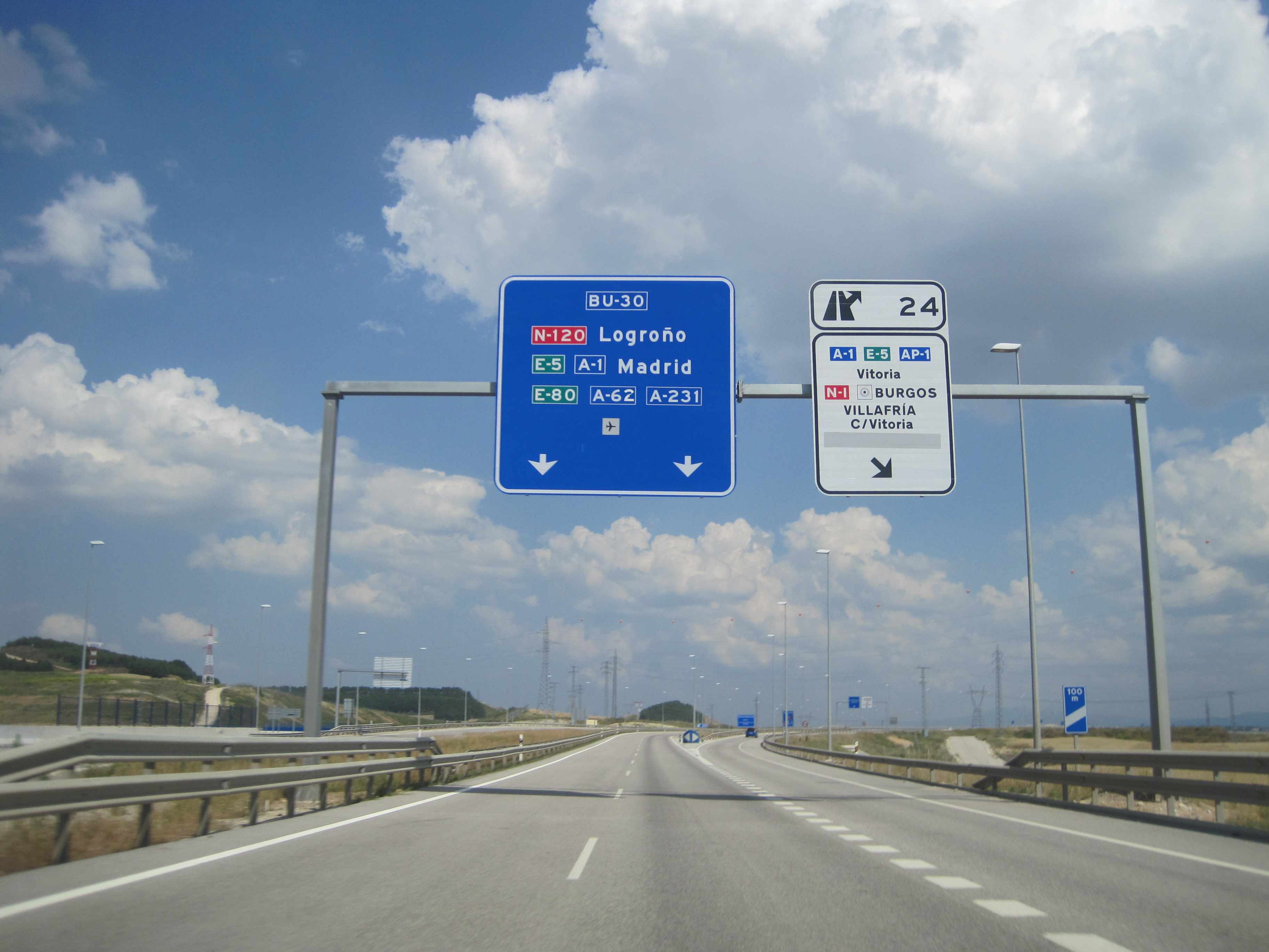 BU-30 en la parte norte.